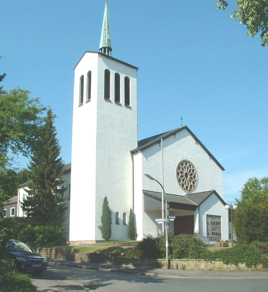 katholische Patroklikirche in Dortmund-Kirchhörde